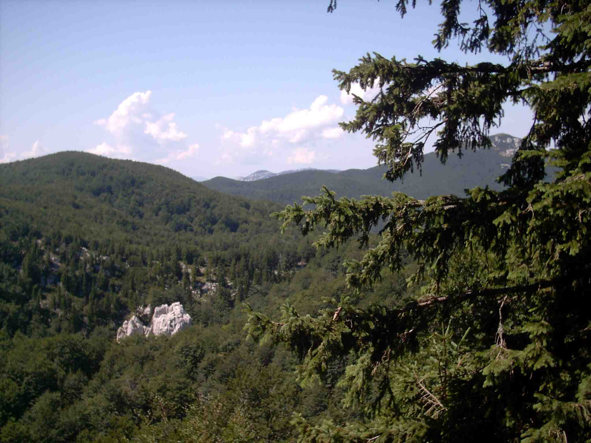 Bild selbst erstellt